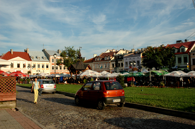 Main Square in Rzeszów